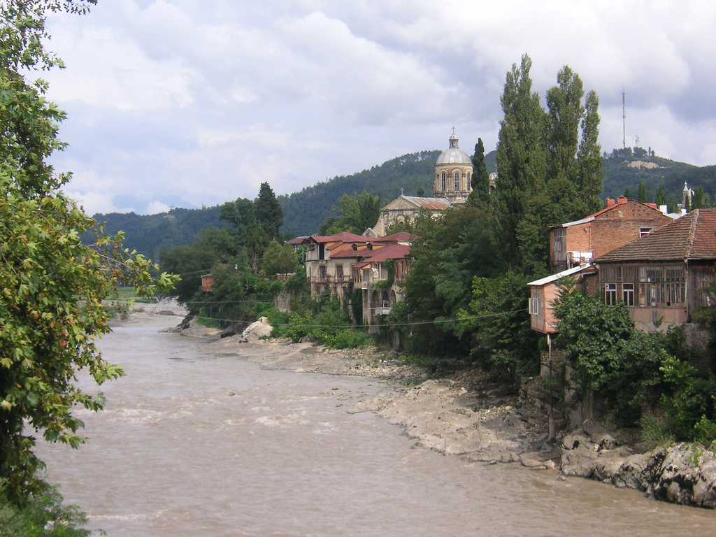 Rioni River in Kutaisi